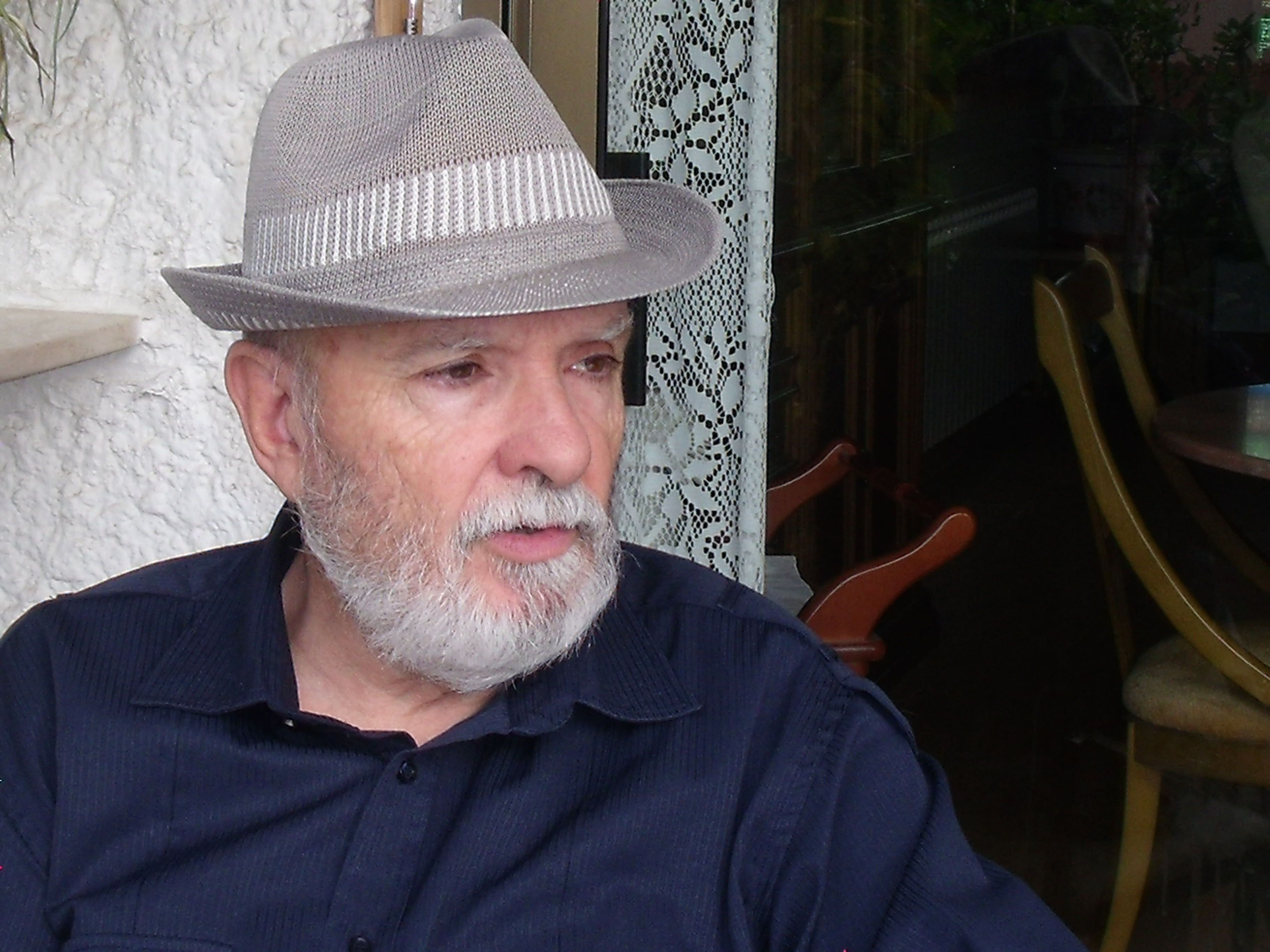 Foto Ralph Barby